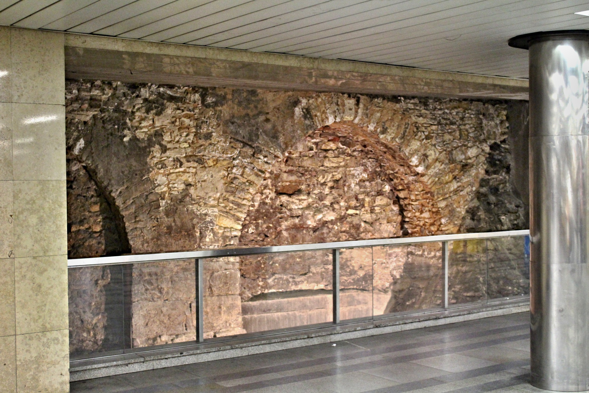 Zbytek mostu na Můstku